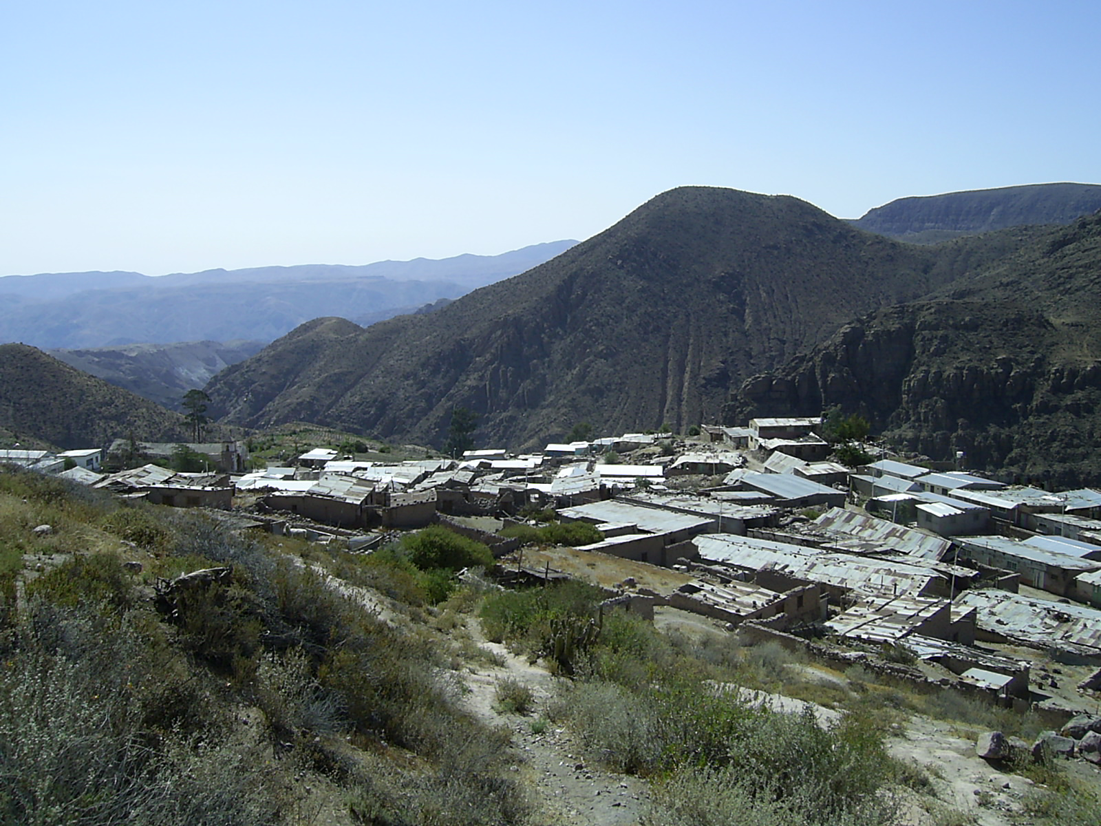 Panorámica del pueblo de Chiapa, desde el sector este